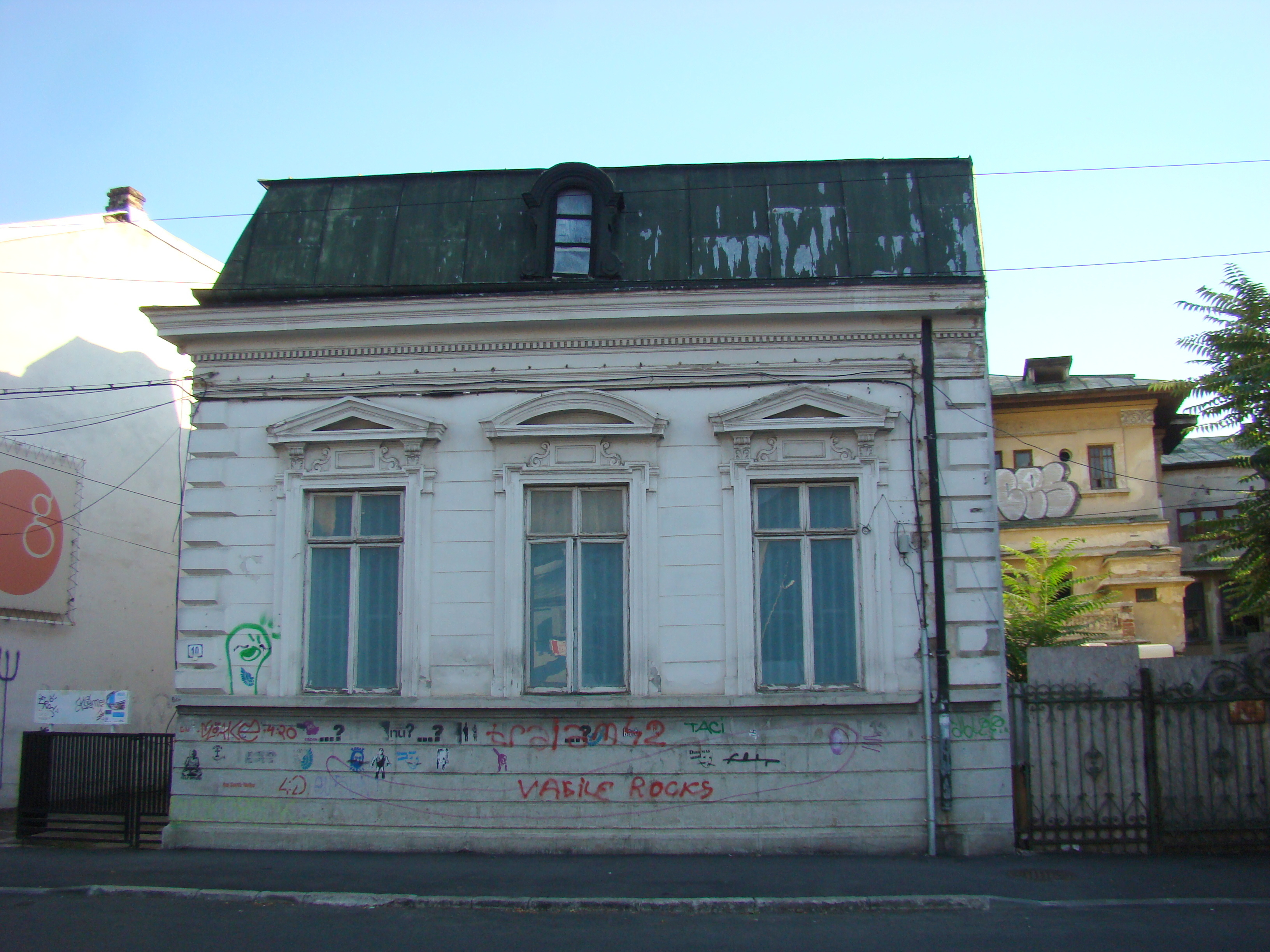 Casă monument istoric, str. Constantin Budișteanu, nr.10